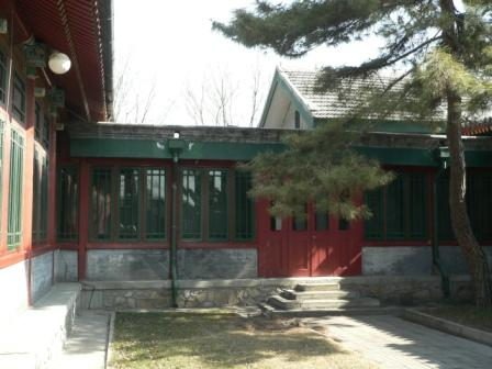 暖廊外部 拍摄